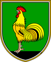 Wappen von Šentjernej Slowenien